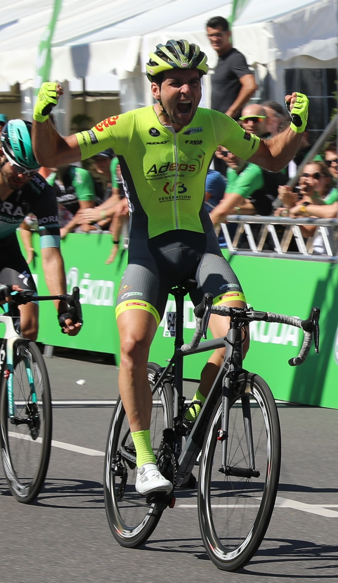 Baptiste Planckaert gewinnt Rund um Köln 2019, vor Christoph Pfingstn